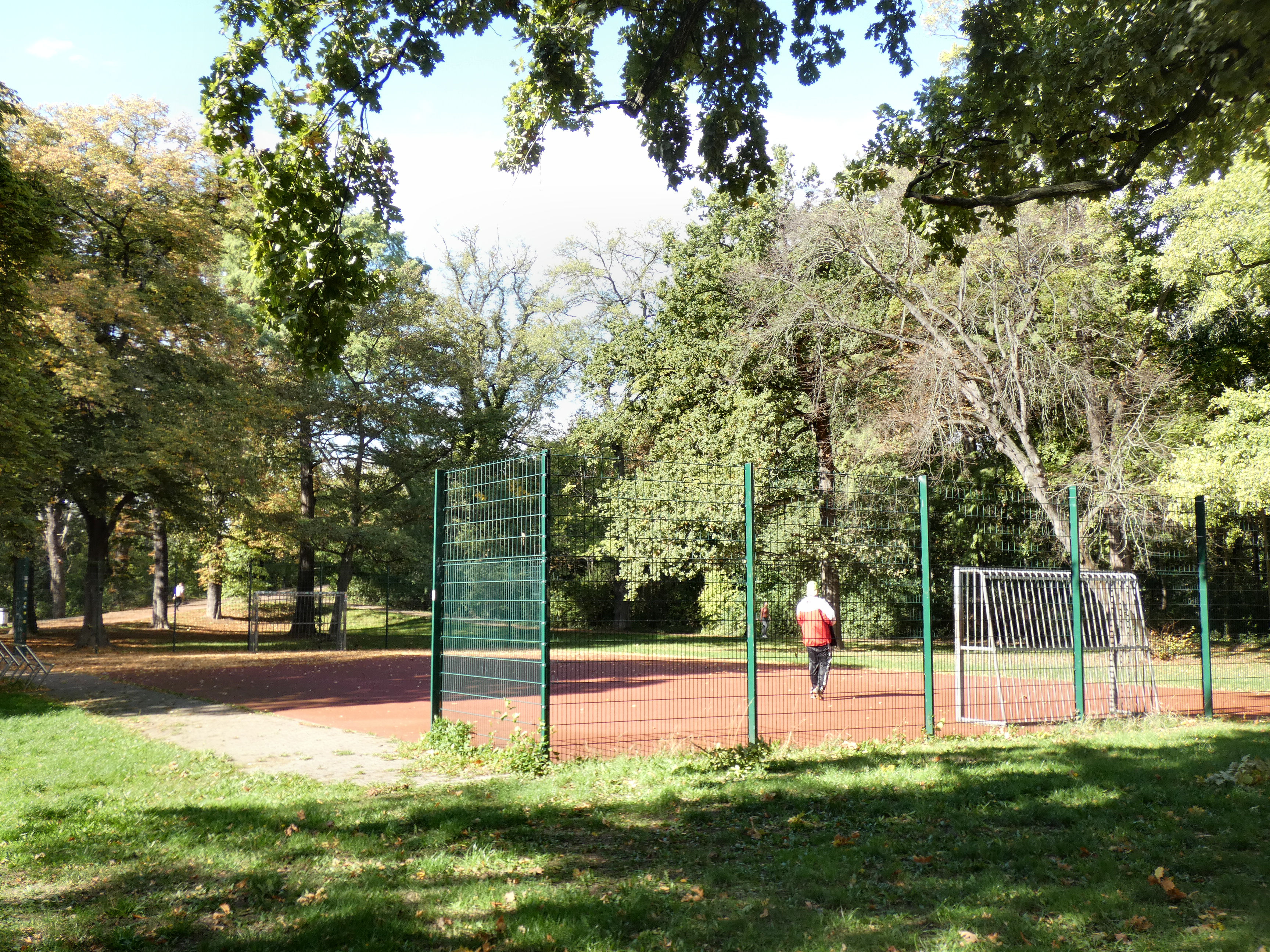 Ballspielplatz auf der Würfelwiese, Halle (Saale)